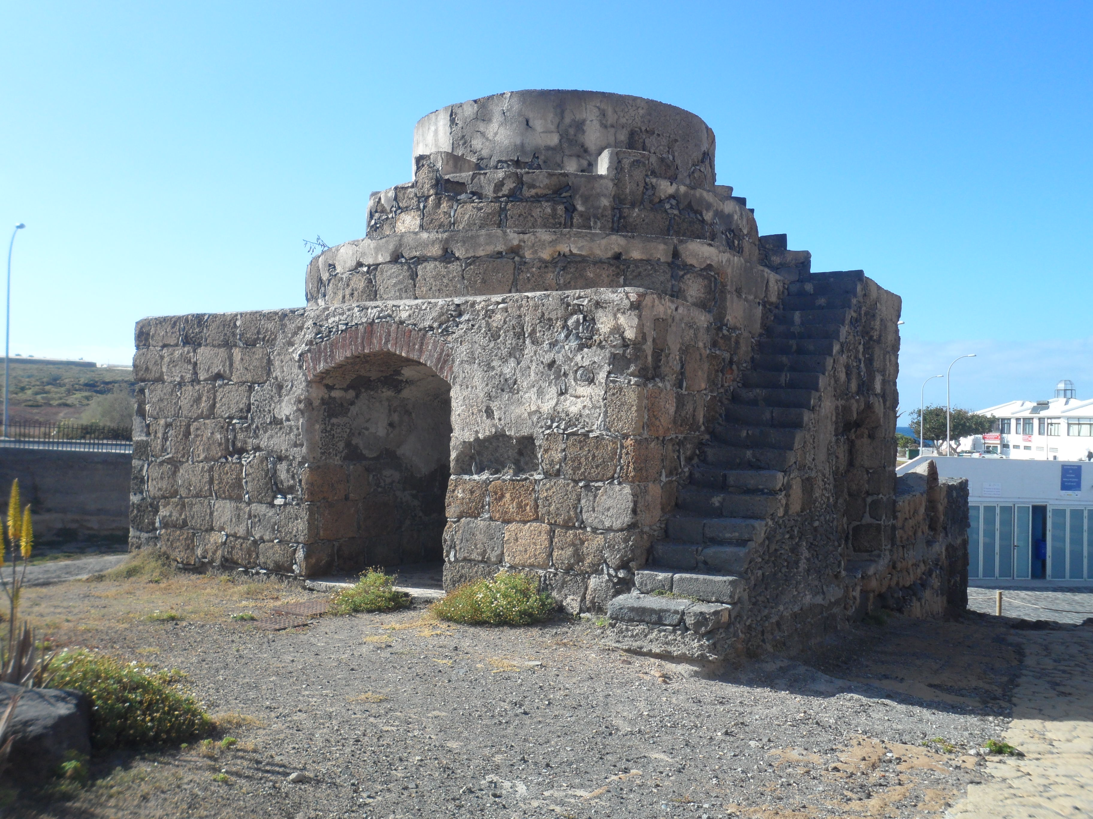 Hornos de cal. Puertito de Los Silos